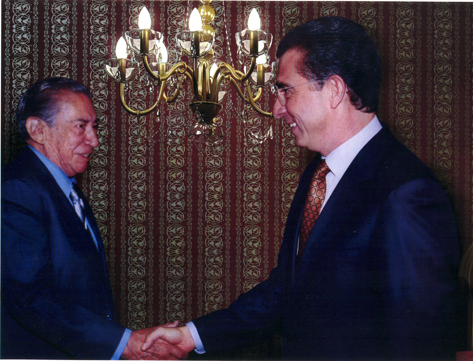 Oscar Vega y el presidente mexicano Ernesto Zedillo